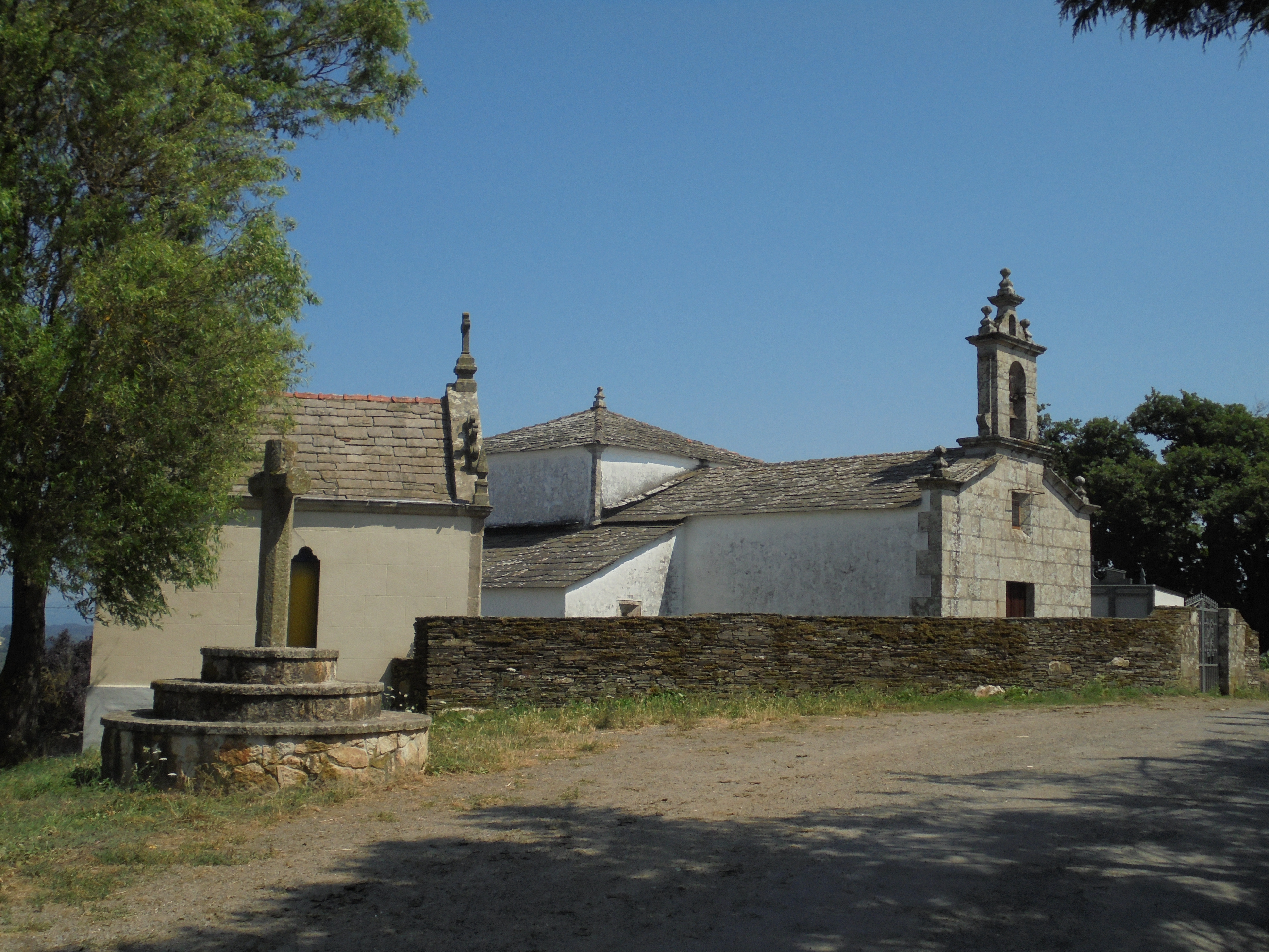 Igrexa parroquial de Santa Marta de Fixós ( Lugo)